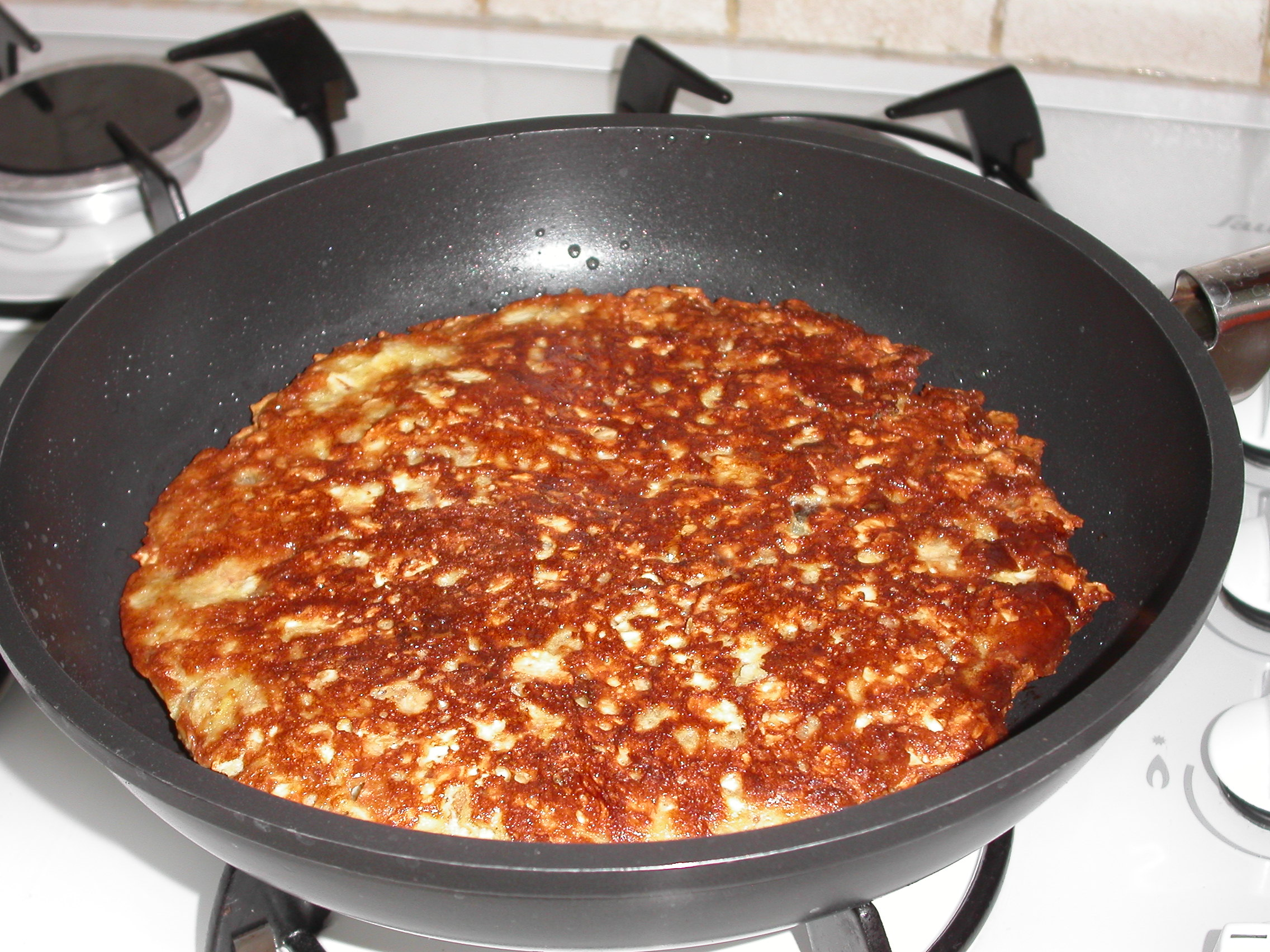 Matzah brei